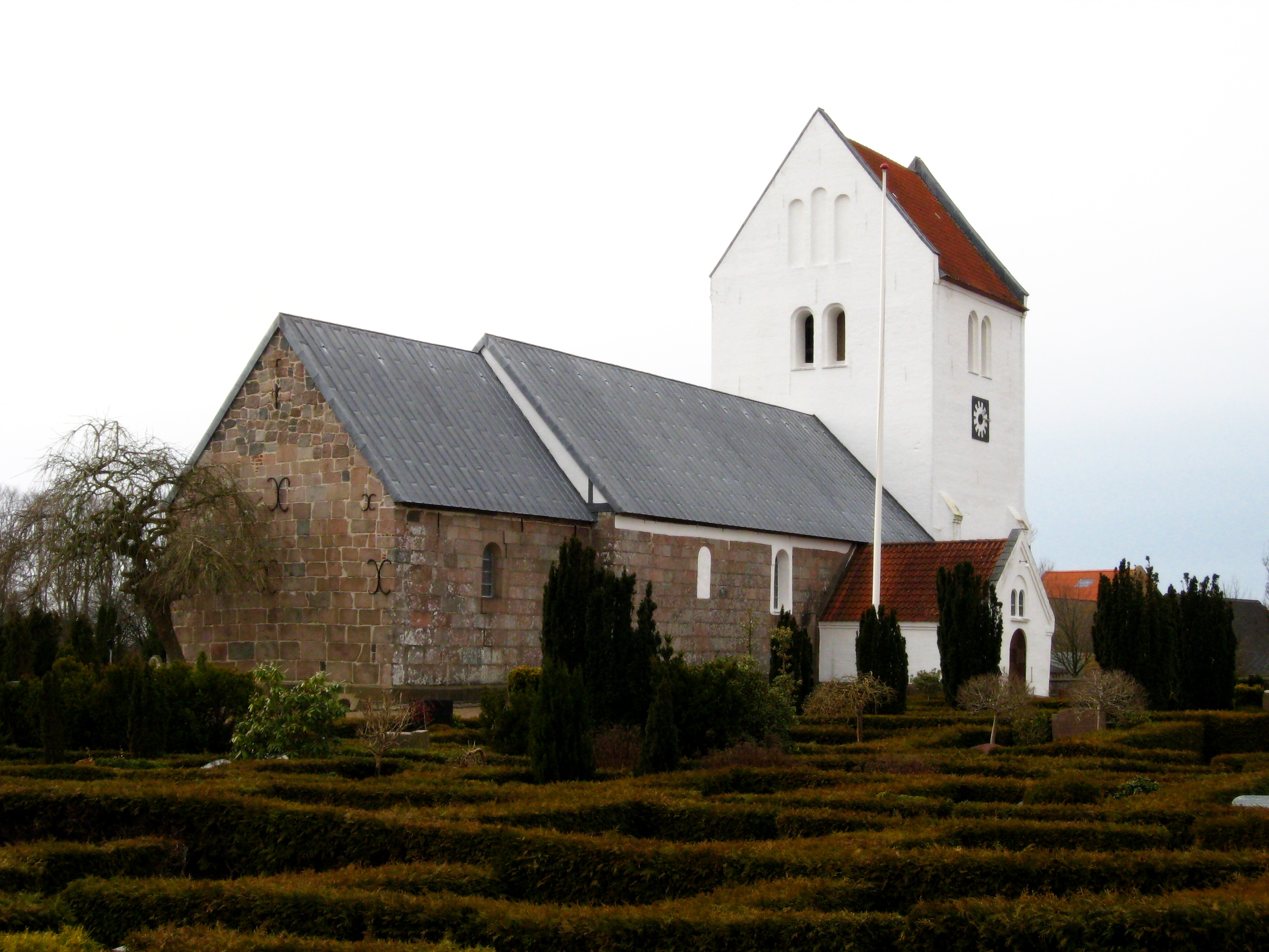 Vrå Kirke, Hjørring Kommune